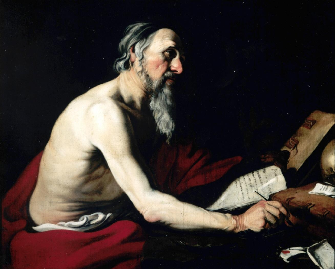 La obra representa a San Jerónimo de Estridón, uno de los Padres de la Iglesia.